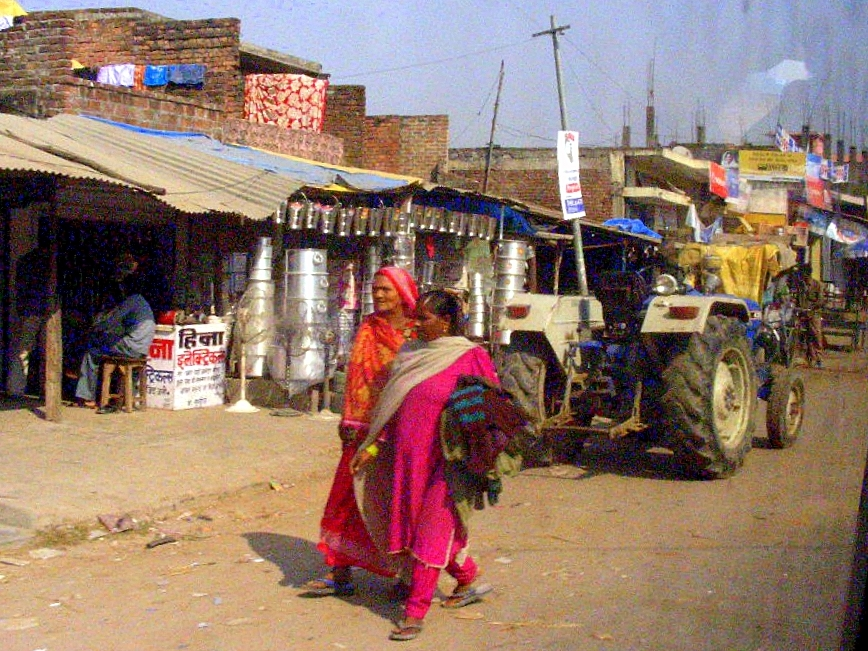 Kolhui village